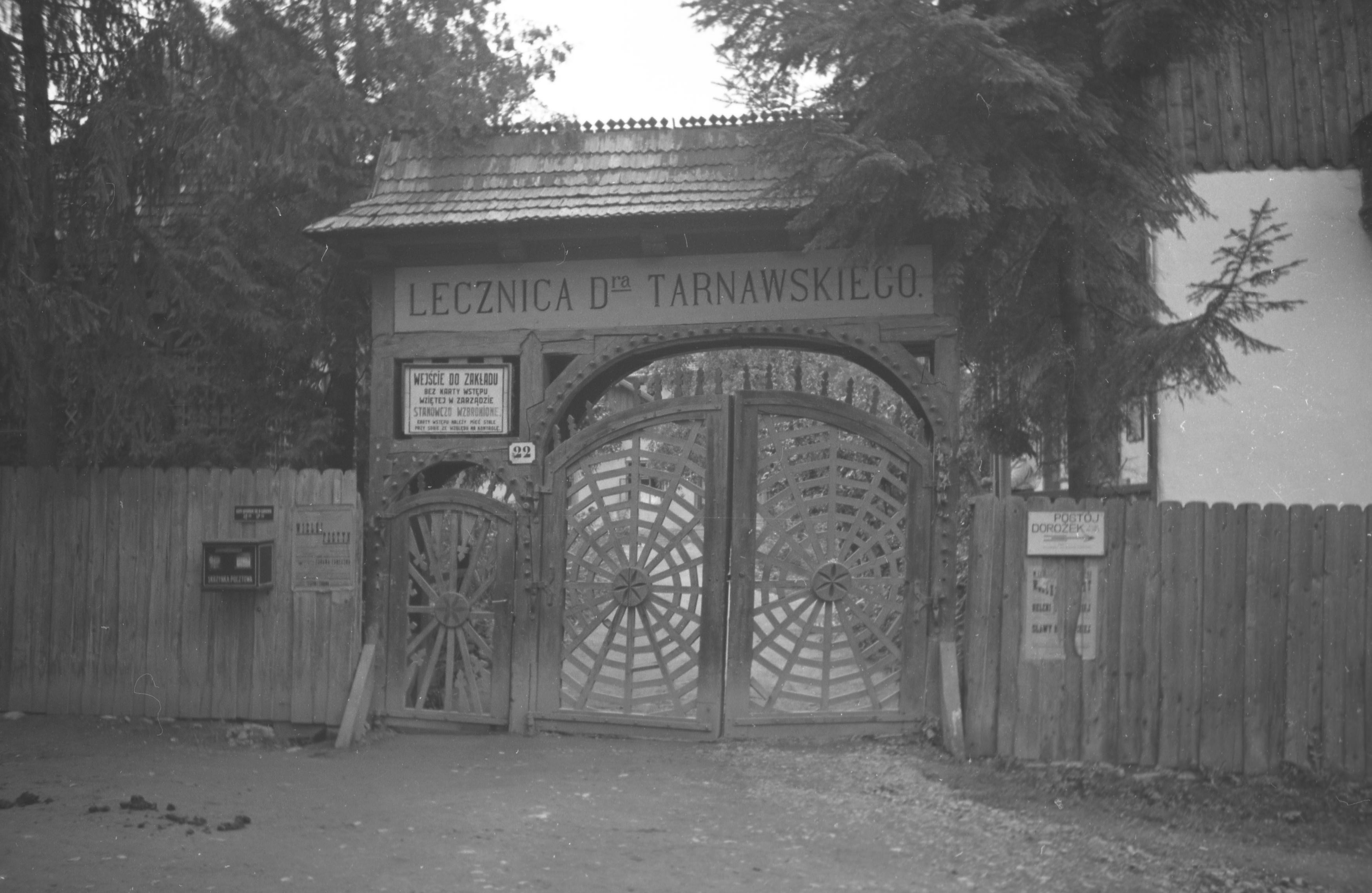 Brama wjazdowa do lecznicy doktora Tarnawskiego. Autor: Poddębski Henryk Zespół: Archiwum fotograficzne Henryka Poddębskiego Data: 1936